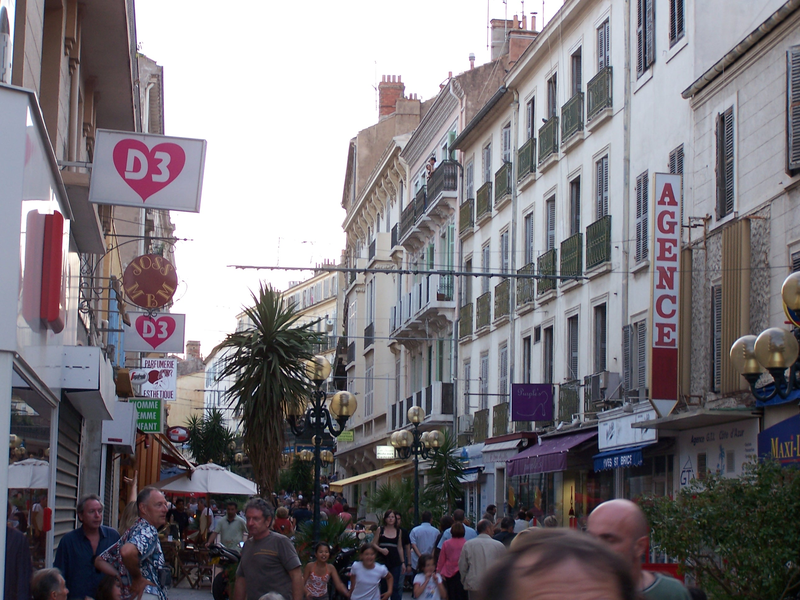 La Zone Piétonne d'Hyères